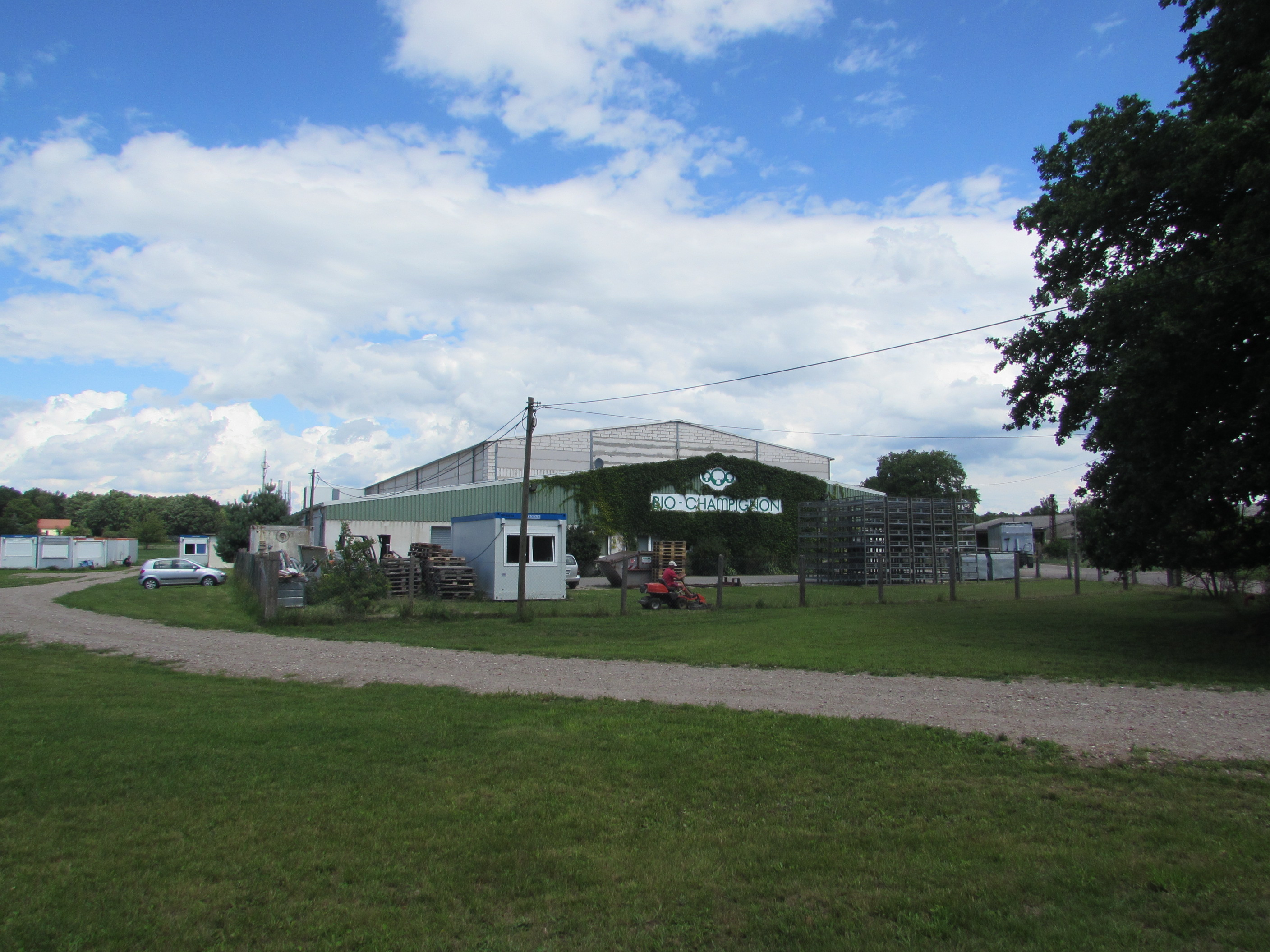 champignonzucht bensdorf